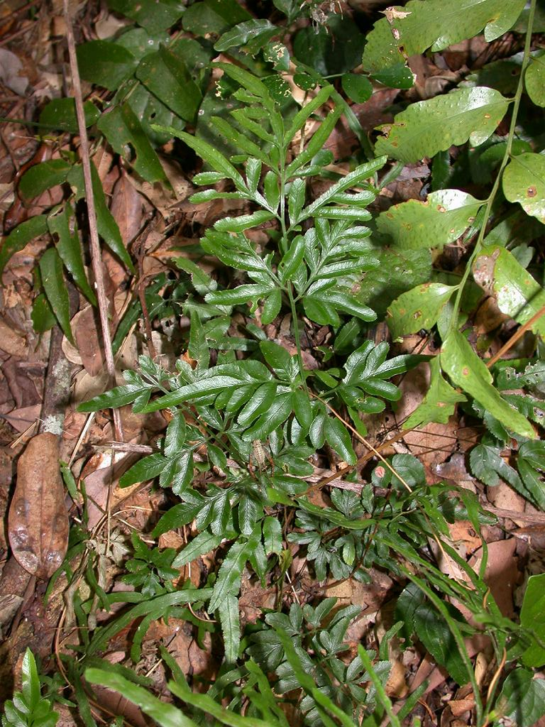 Pteris ensiformis：ホコシダ 2004/08/12 沖縄本島南部：Okinawa Islamd, Japan